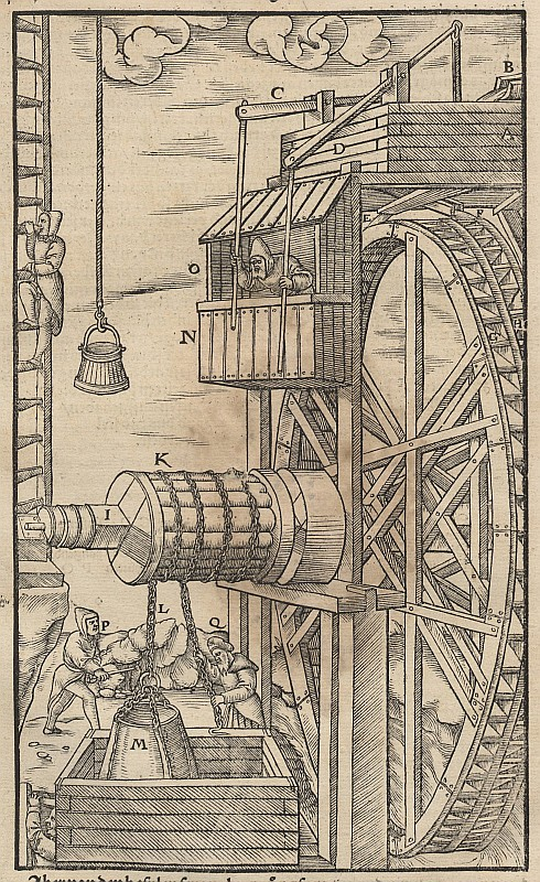 Original image description from the Deutsche Fotothek Bergwerk & Bergbau & Wasserkunst & Spille & Seiltrommel & Bulgen & Treibehaus